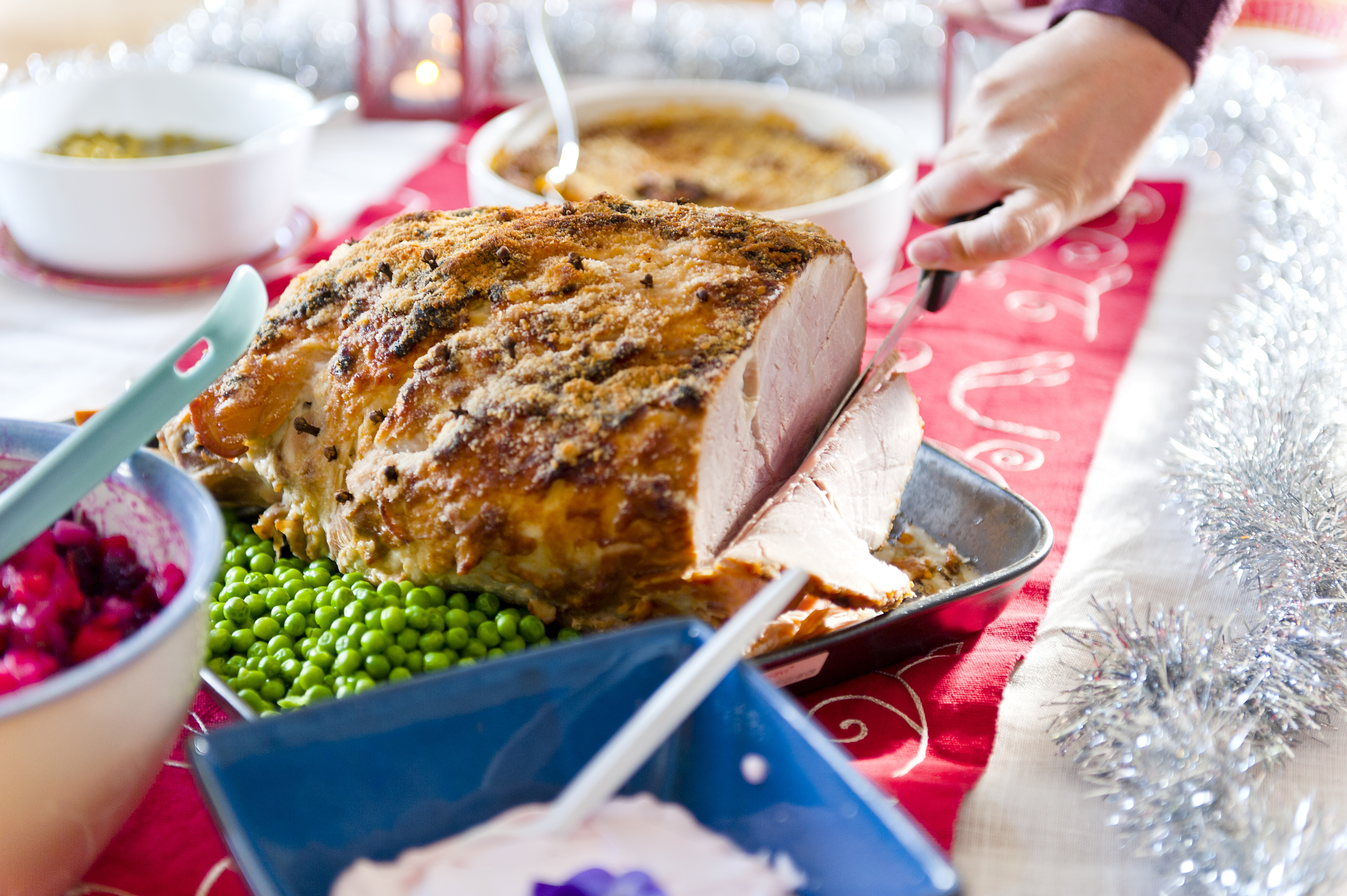 Joulukinkku keskellä kuuminta kesää =)